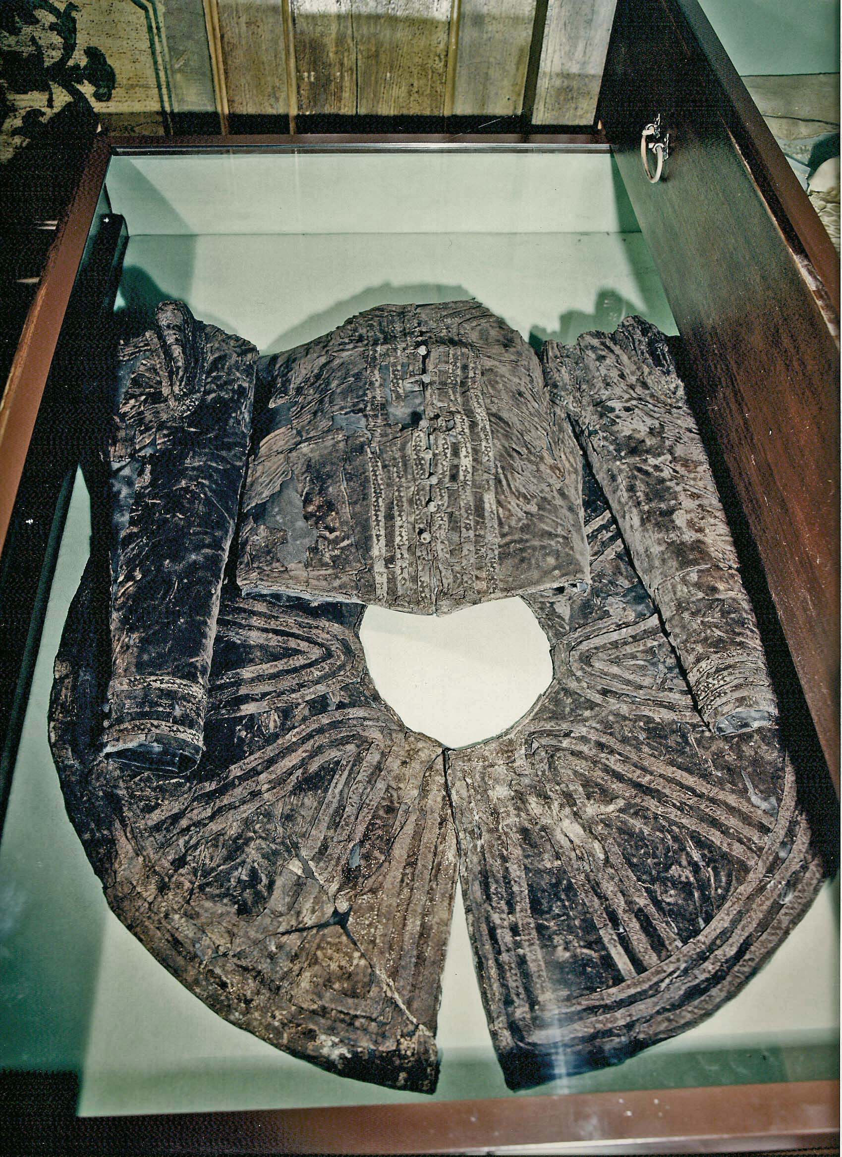 Abito di Francesco Ferrante d'Avalos. Napoli, San Domenico Maggiore, Sala del Tesoro.